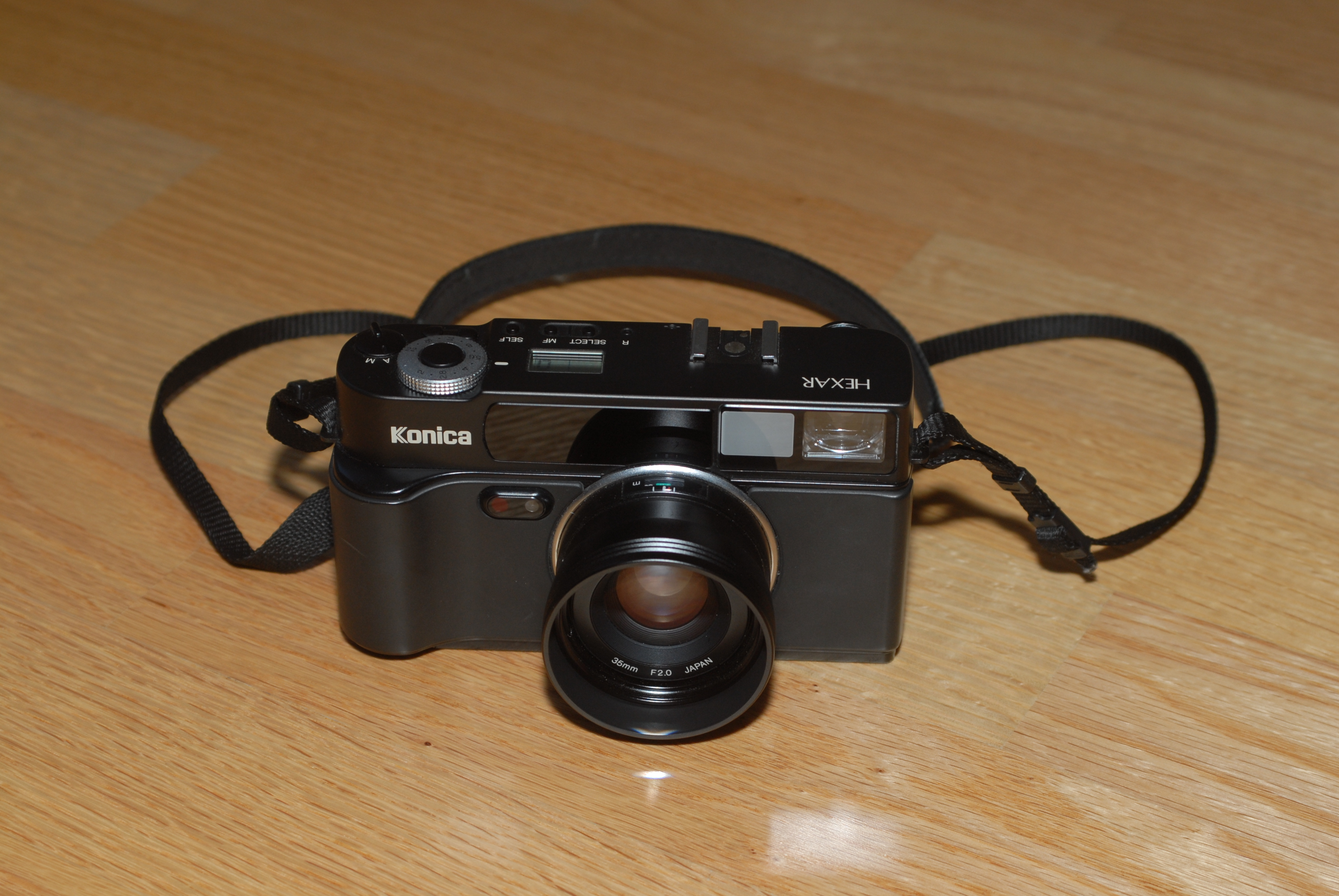 Konica Hexar